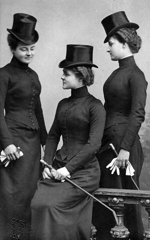 Prinzessin Hermine Reuss ältere Linie mit ihren Schwestern Caroline und Emma